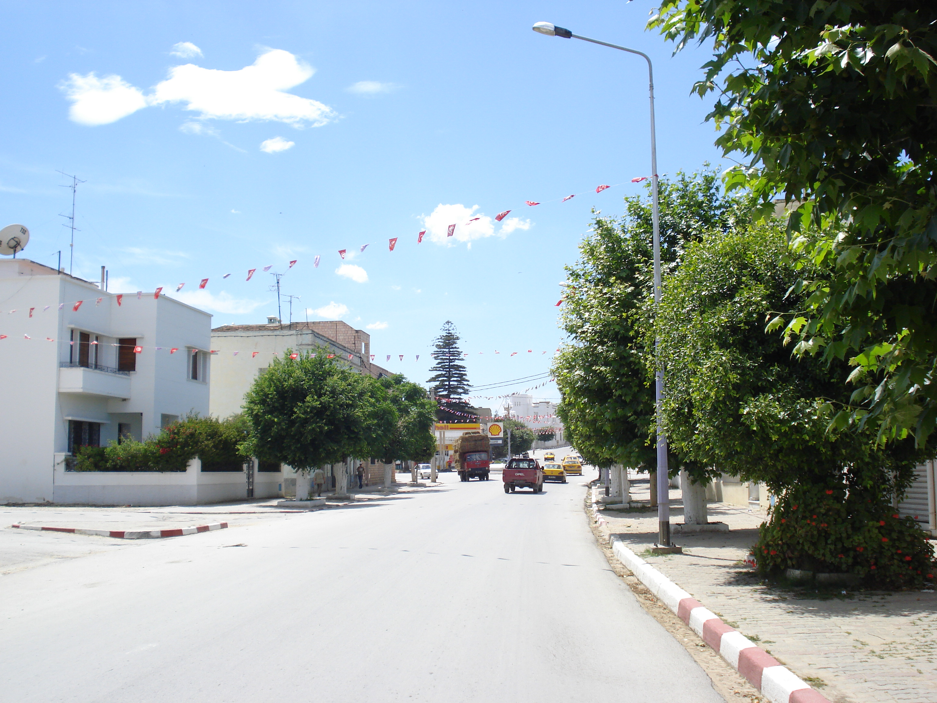 Mateur, Tunisia